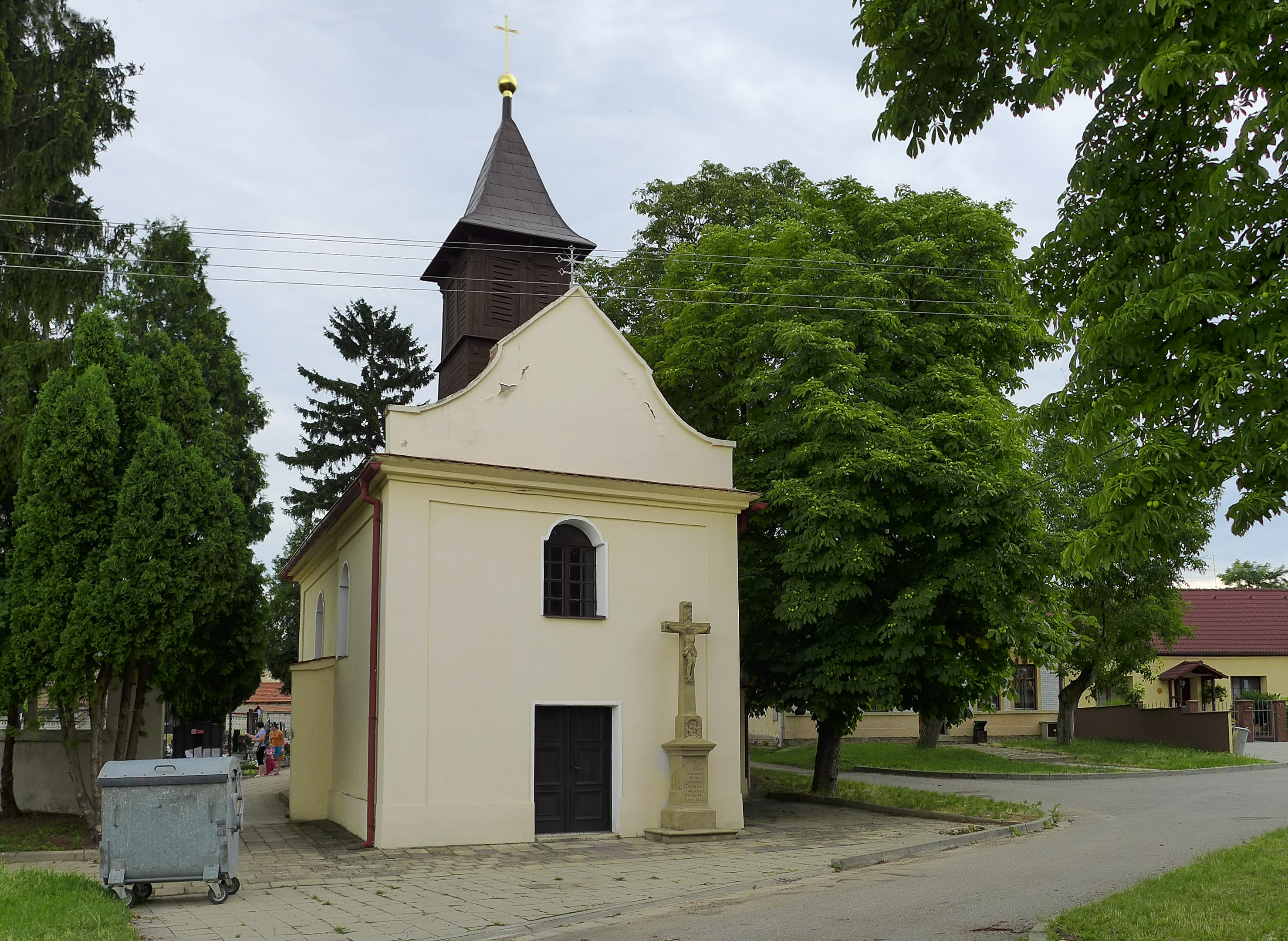 Kaple sv. Cyrila a Metoděje (Smolín), Smolín.